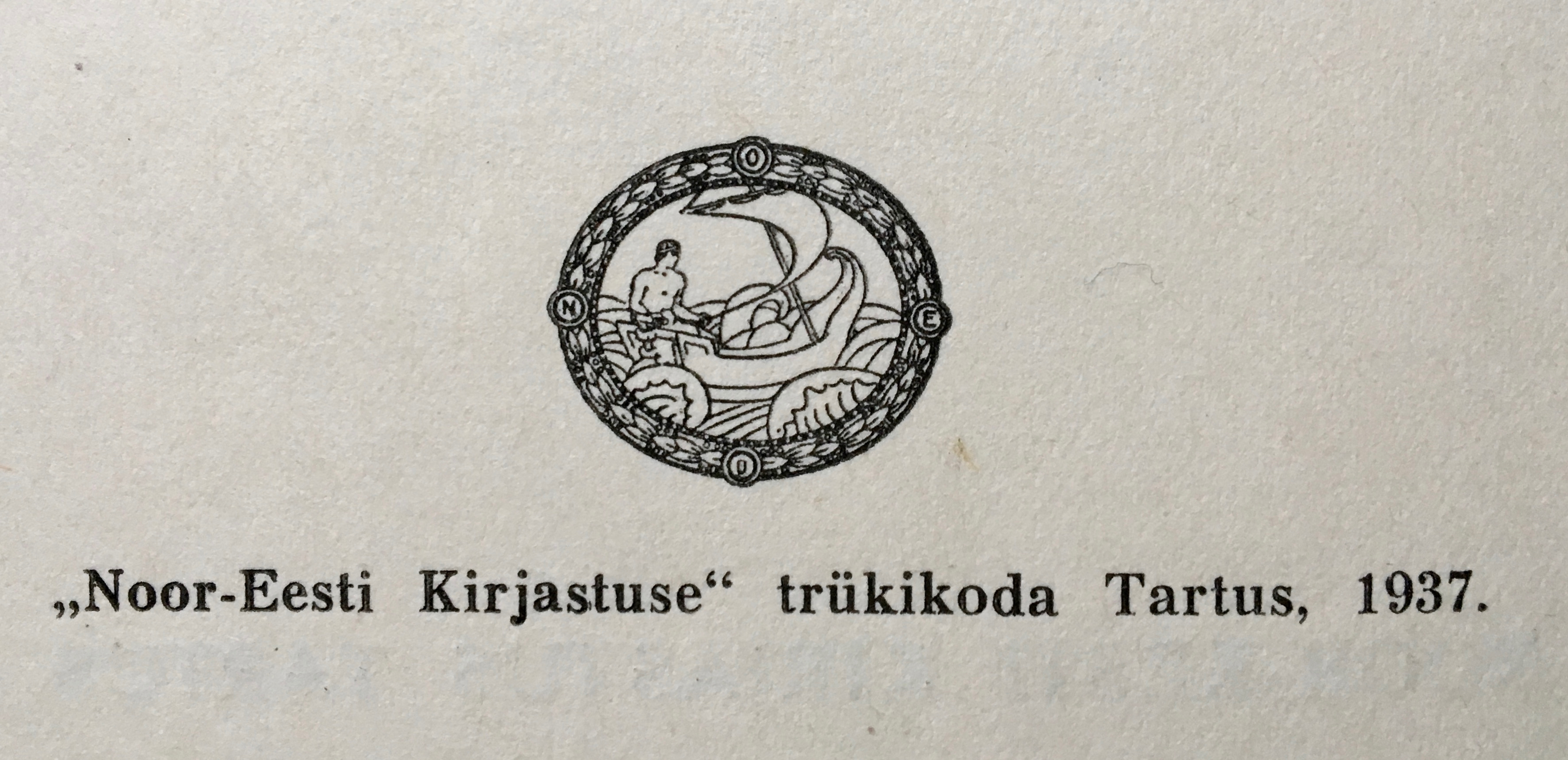 Noor-Eesti embleem